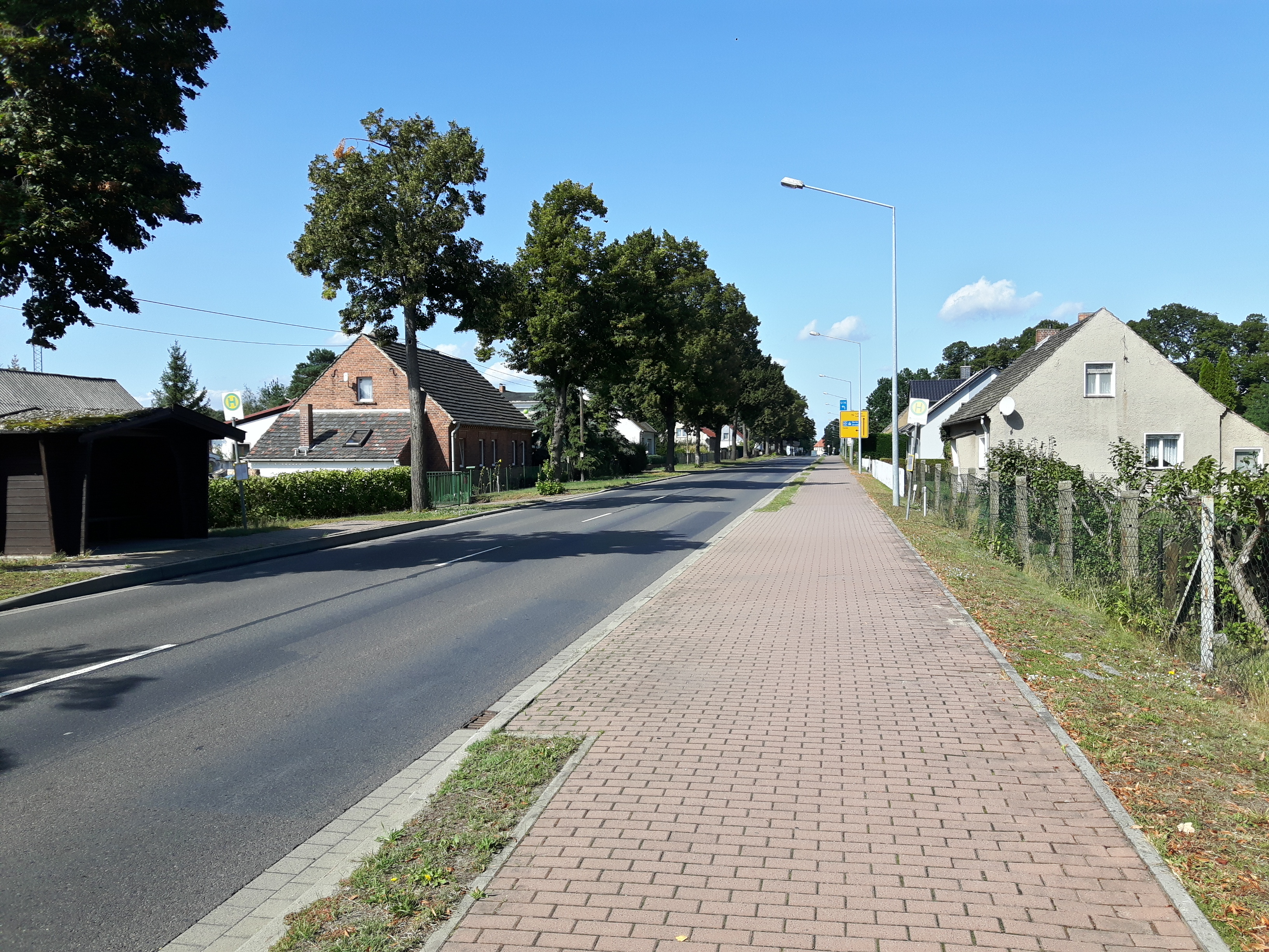 Die Boblitzer Chausseestraße (Landesstraße 49) in der Ortsdurchfahrt Boblitz, Fahrtrichtung Lübbenau.